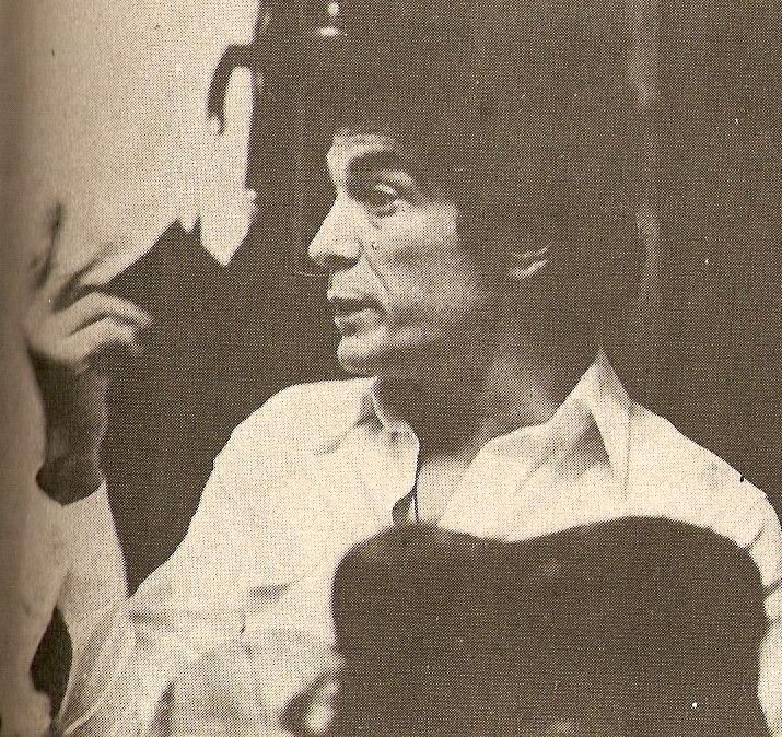 Alfredo Alcón, actor argentino